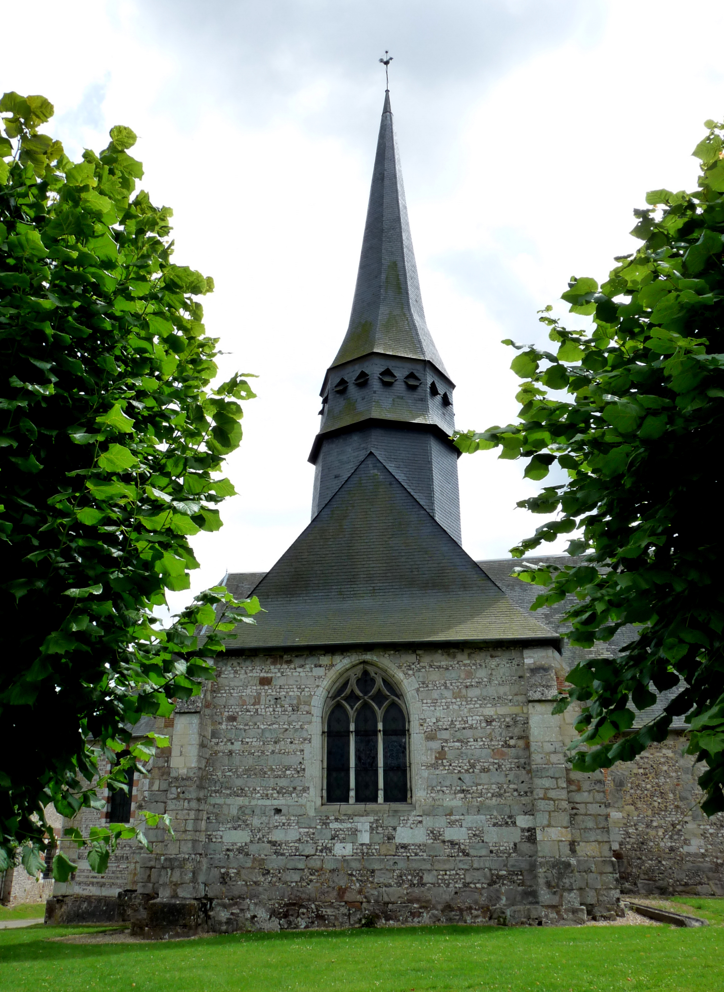 Église Notre-Dame-et-Saint-Julien de Puchay